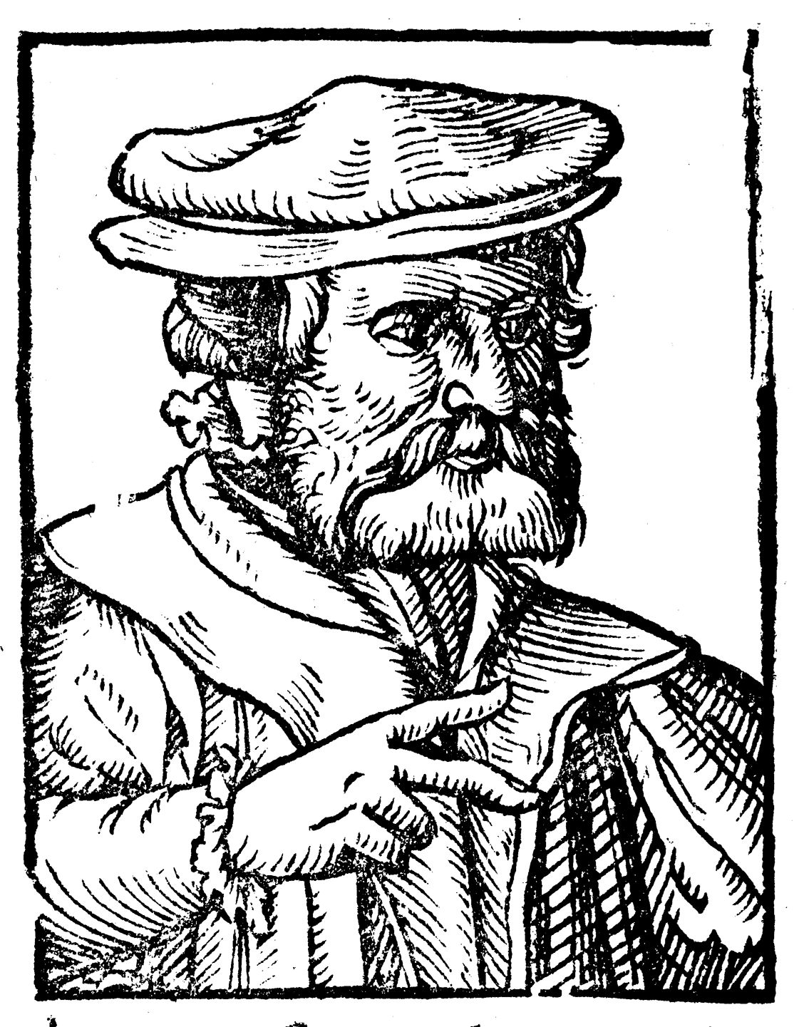 Wolfgang Fabricius Capito (1478–1541), Reformator in Strassburg Achtung: Das gleich Bild wird von Pantaleon auch für andere Personen verwendet.